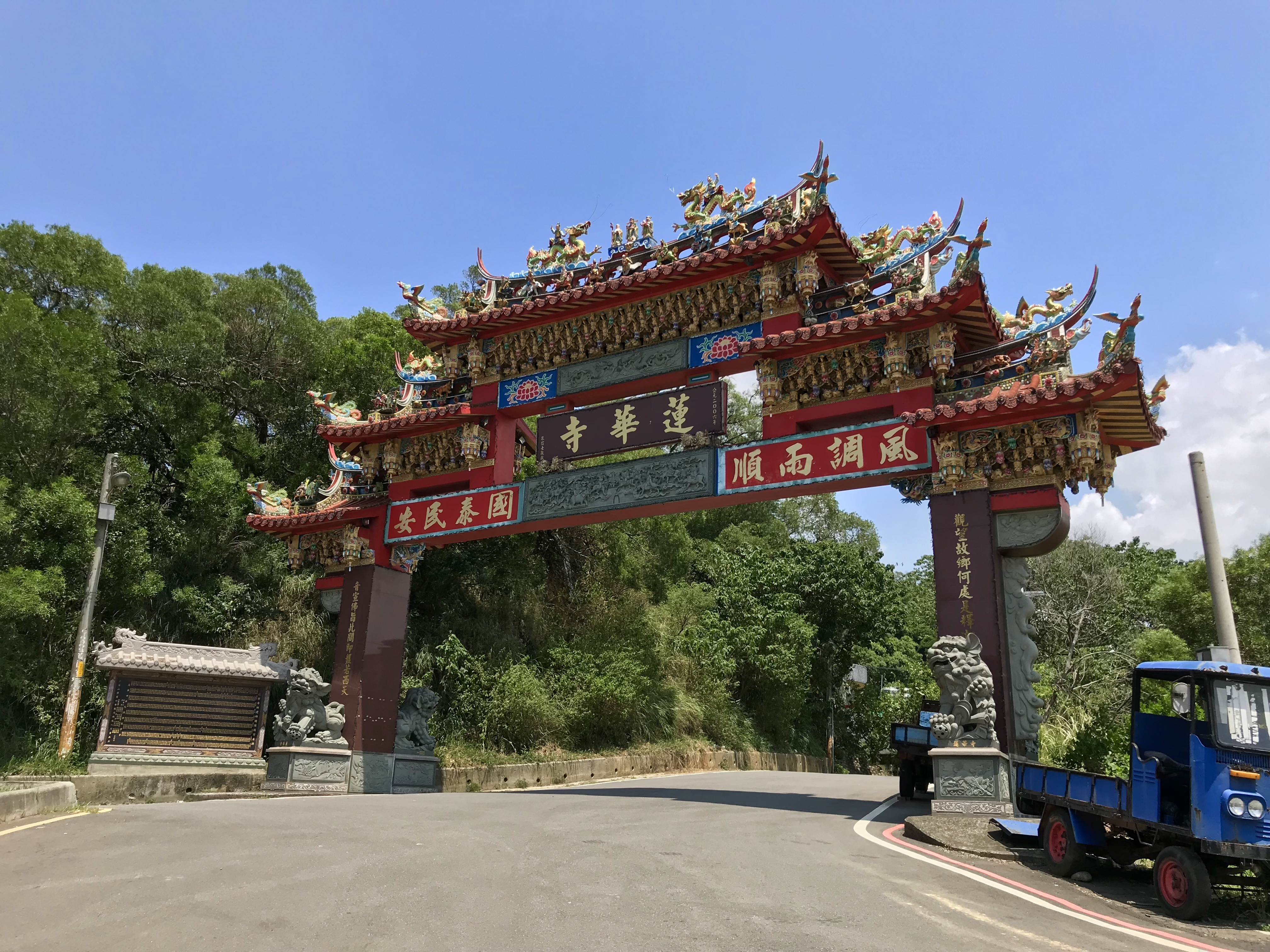 竹北蓮華寺牌樓